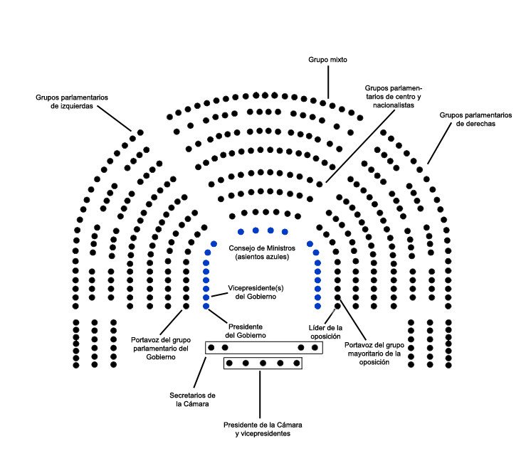 Distribución de asientos en el Congreso de los Diputados de España y situación del Gobierno y los grupos parlamentarios, en una legislatura con mayoría de izquierdas.